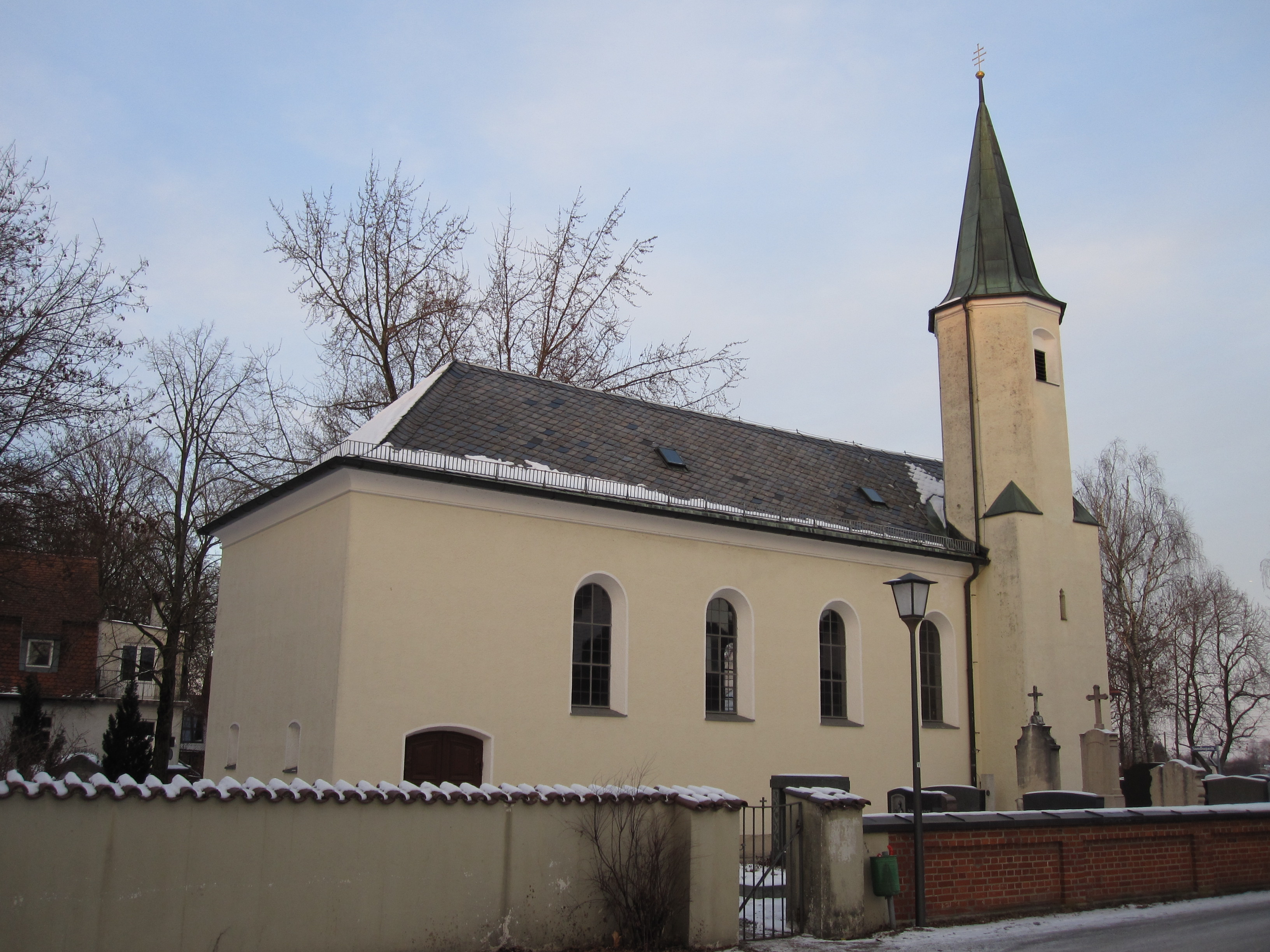 Katholische Kirche St. Philipp und Jakob in München-Daglfing